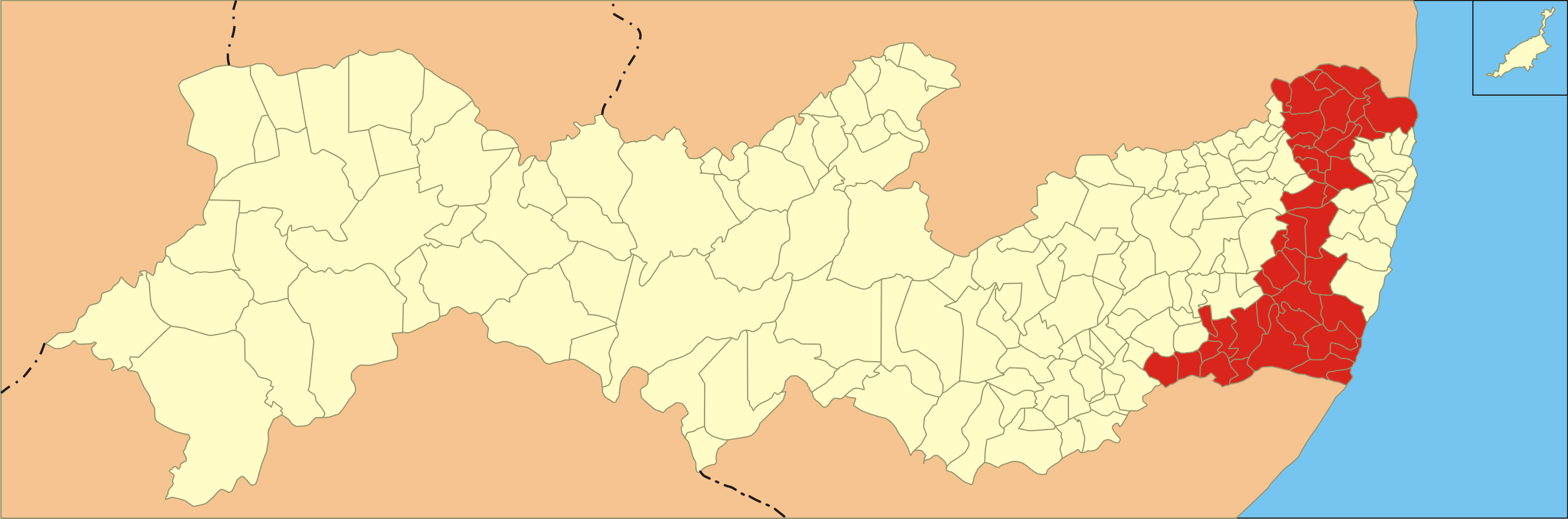 Localização da mesorregião no estado de Pernambuco.